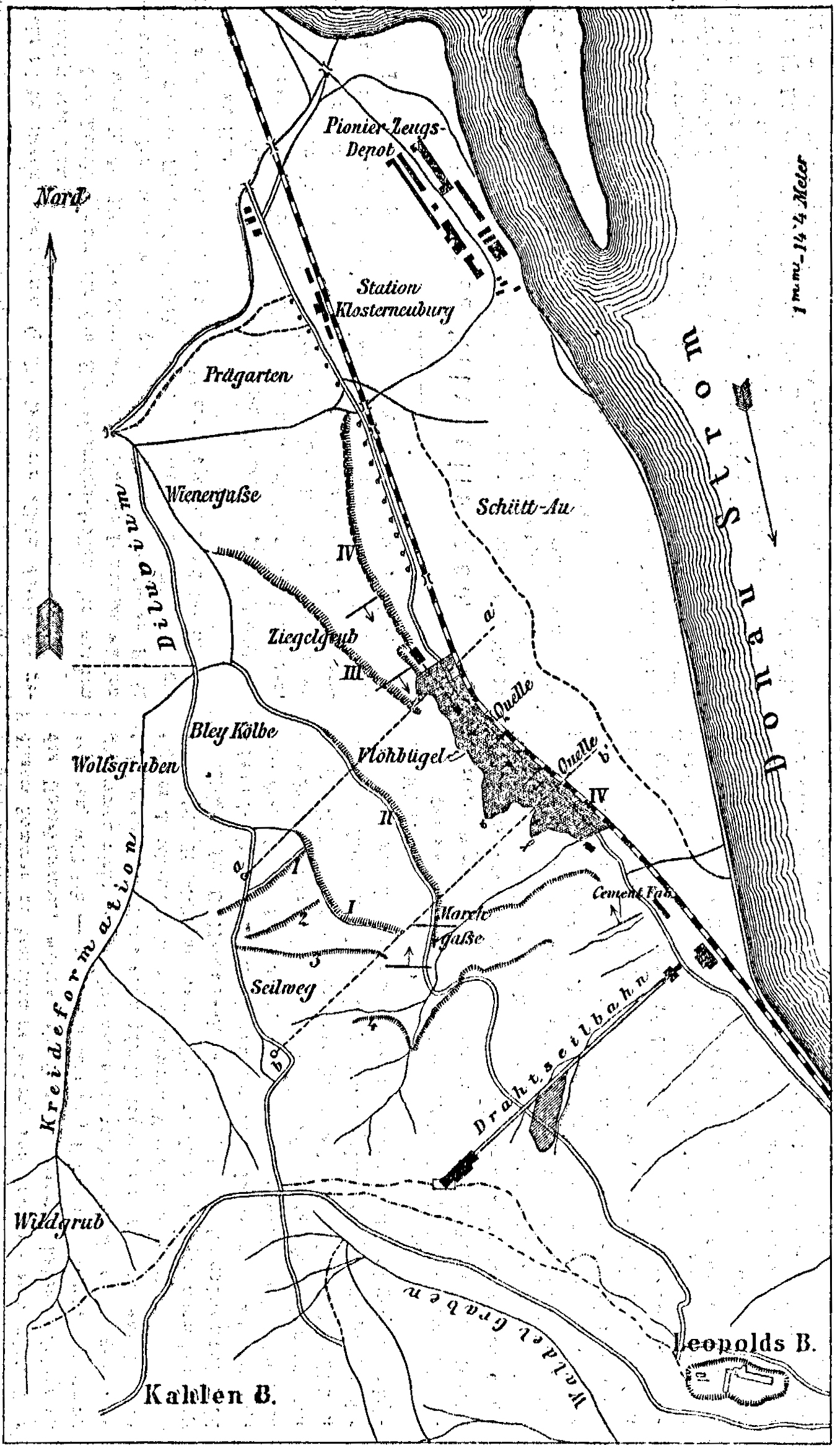 Wien-Döbling, Leopoldsberg, Drahtseilbahn, Lageplan